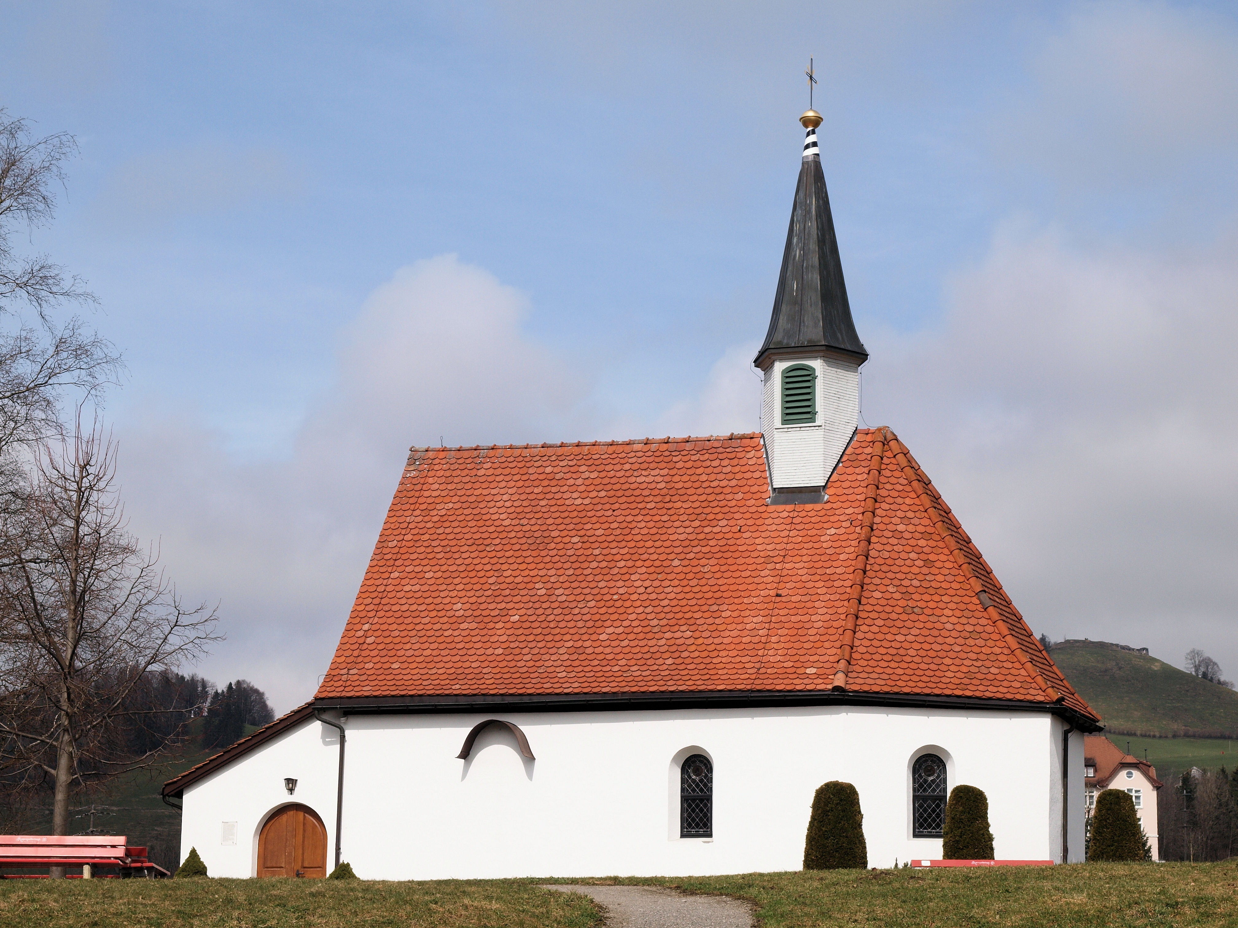 Die Lourdeskapelle in Appenzell (Sitterstrasse Nr. 26). Die Kapelle wurde als Siechenkapelle St. Martin 1591 erbaut. Die Siechenkapelle wurde 1904 geschlossen und 1936 als Lourdeskapelle wieder in Betrieb genommen.